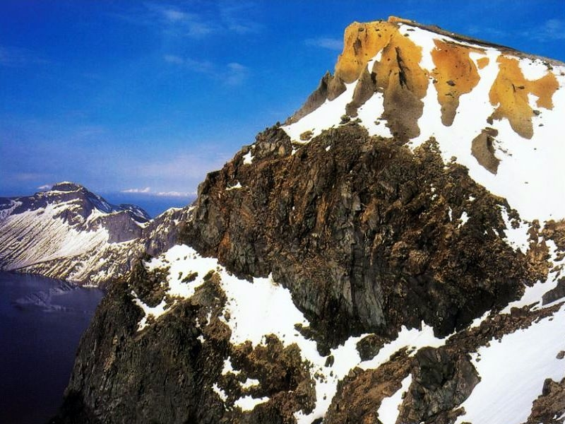 中文（中国大陆）: 长白山天文峰，海拔2670米，峰顶如鹰嘴，俗称“鹰嘴峰”。主要由灰白色和黄色火山浮石组成。